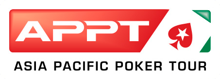 Logo der Asia Pacific Poker Tour (seit 2018)